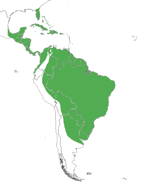 Aramus guarauna: Distribution